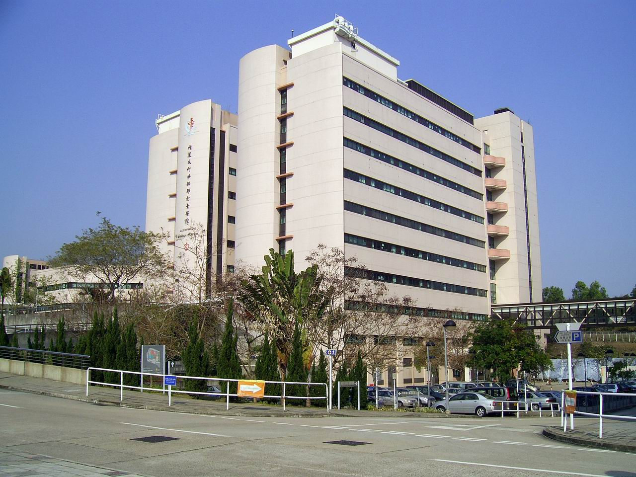 那打素醫院大埔新院